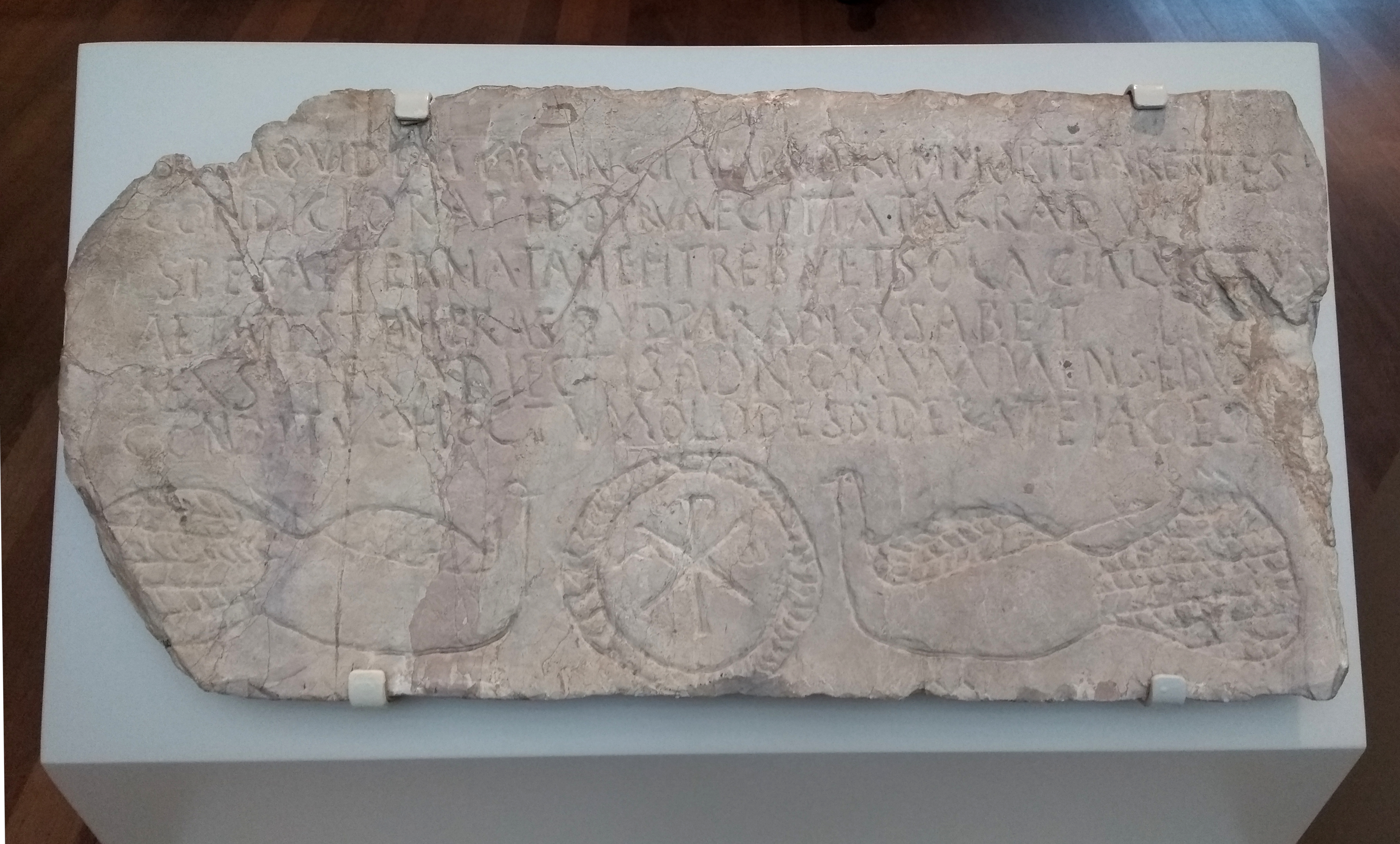 Frühmittelalterlicher Grabstein des Desideratus aus Kobern-Gondorf, Rheinisches Landesmuseum Bonn